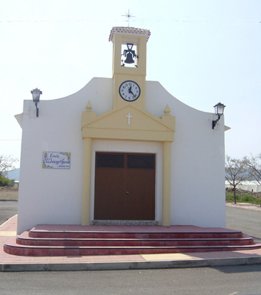 Iglesia de Santo Domingo de Guzman